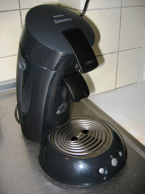 Senseo